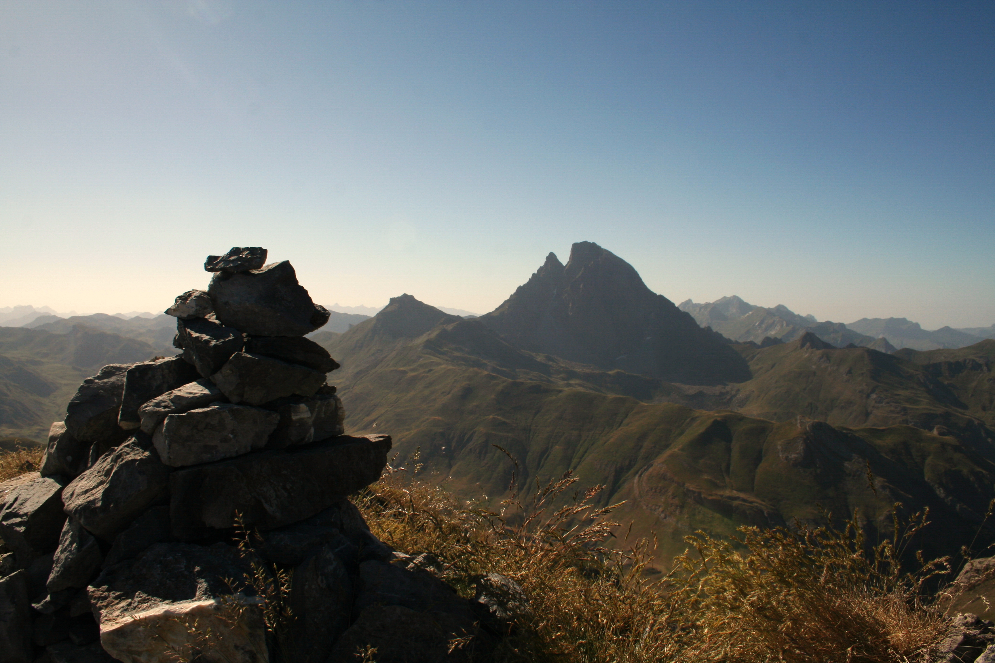 Pic du Midi d'Ossau avec cairn au premier plan, et la structure géologique de l'ancien volcan au second plan..